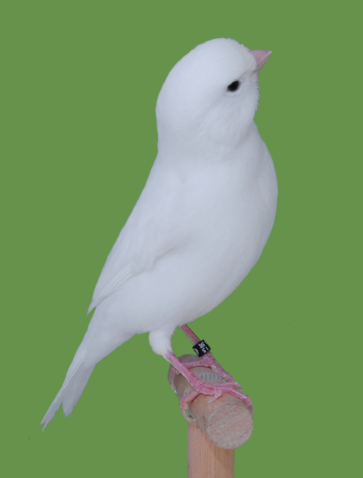 Farbenkanarie aufgehellt rezessivweiß